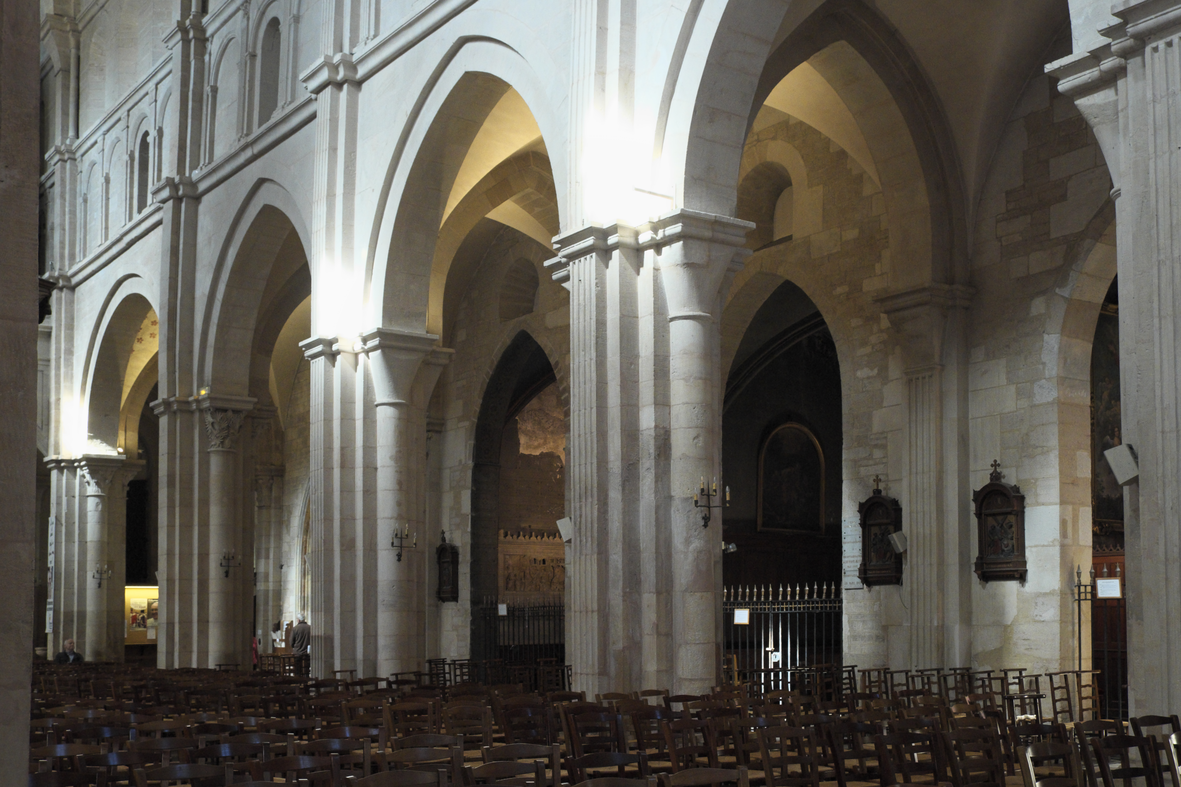 Katholische Pfarrkirche, ehemalige Stiftskirche, Notre-Dame in Beaune im Département Côte-d’Or (Bourgogne-Franche-Comté/Frankreich), Innenraum